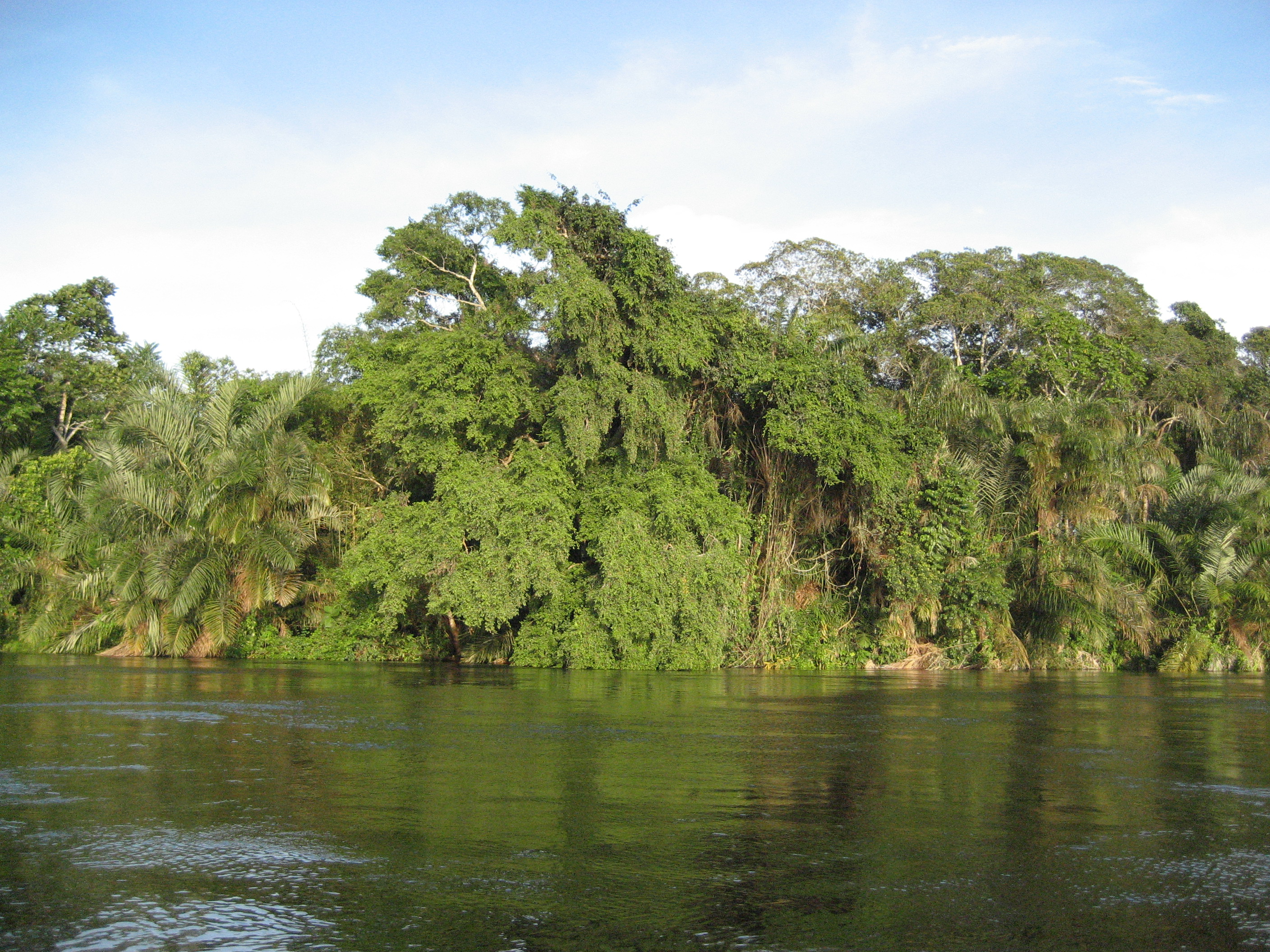 Rives de l'Alima, affluent du Congo, en République du Congo.